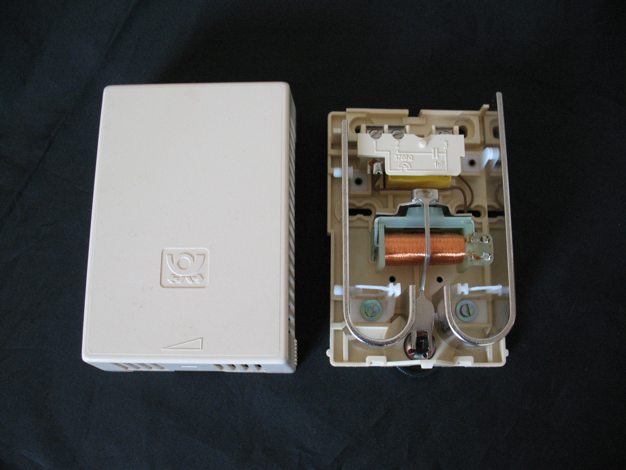 Wechselstrom Innenwecker Modell WK 952 der deutschen Bundespost